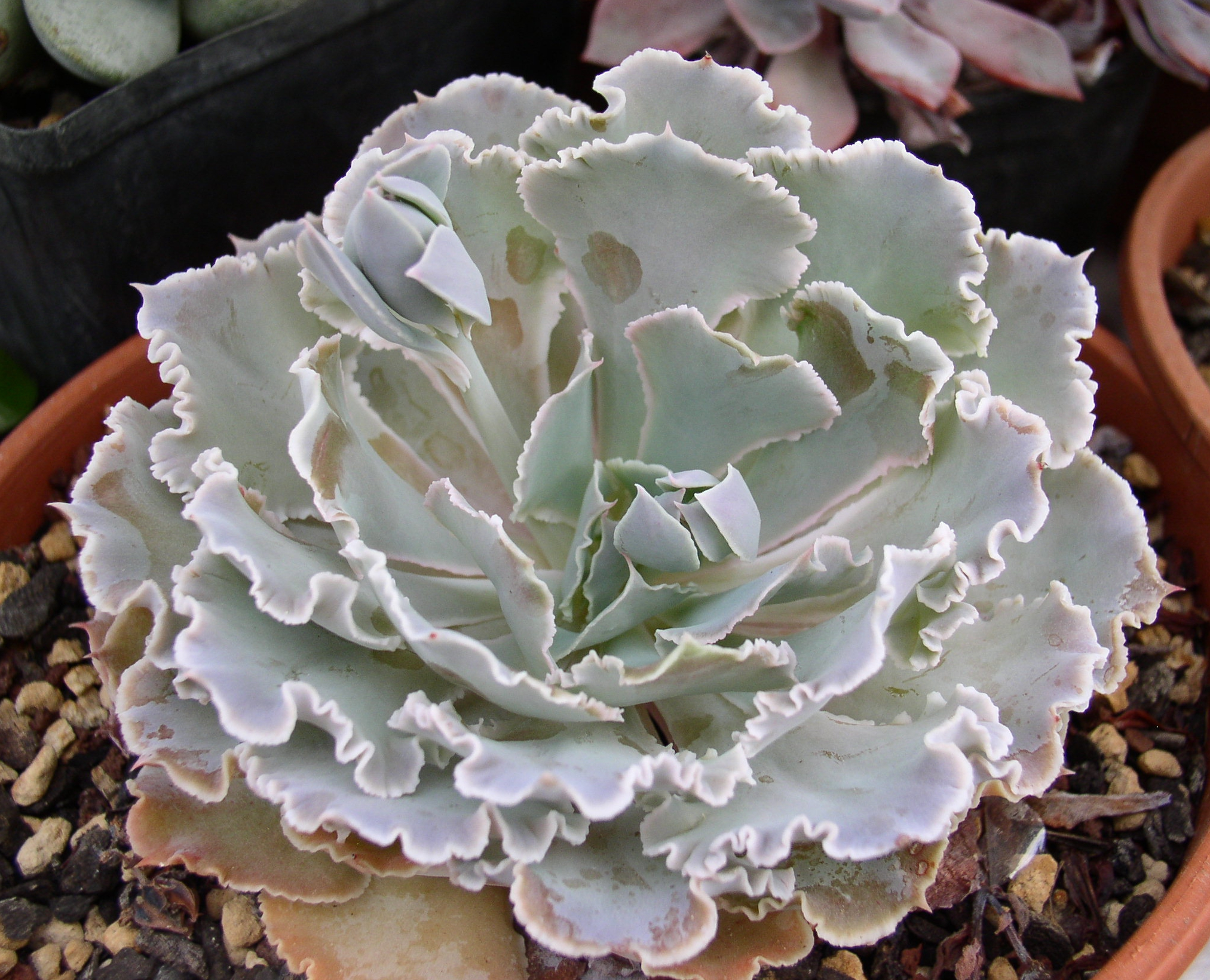 Echeveria shaviana, collection nationale CCVS Echeveria. La photo a été prise le 19/05/2007. Cette espèce est originaire du N-E jusqu'au Centre du Mexique dans les États de Nuevo Leon, Tamaulipas et Coahuila. Elle pousse à l'ombre des pins.